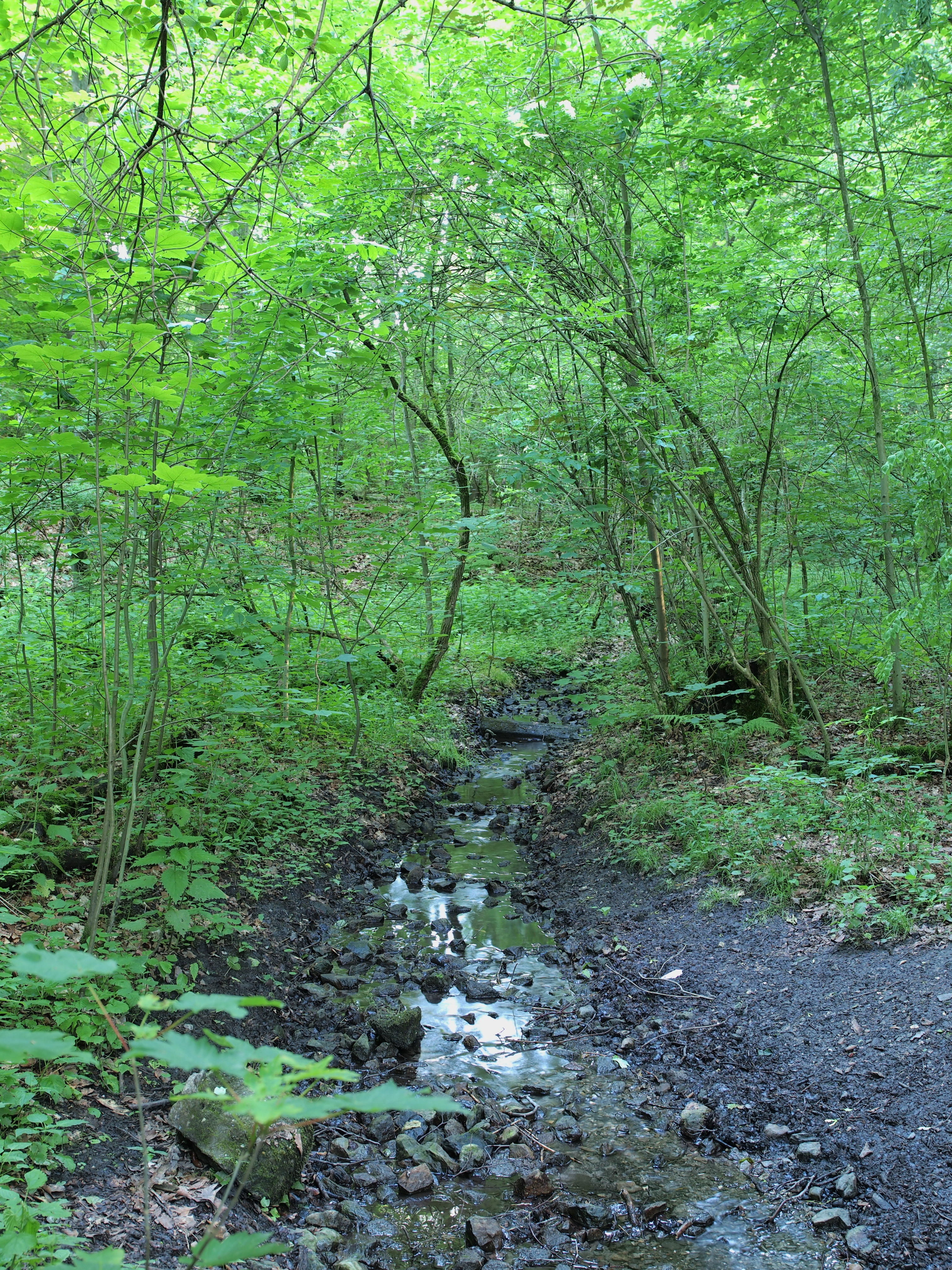 Naturschutzgebiet Langeloh–In der Hemke in Herne, der Roßbach im Tal